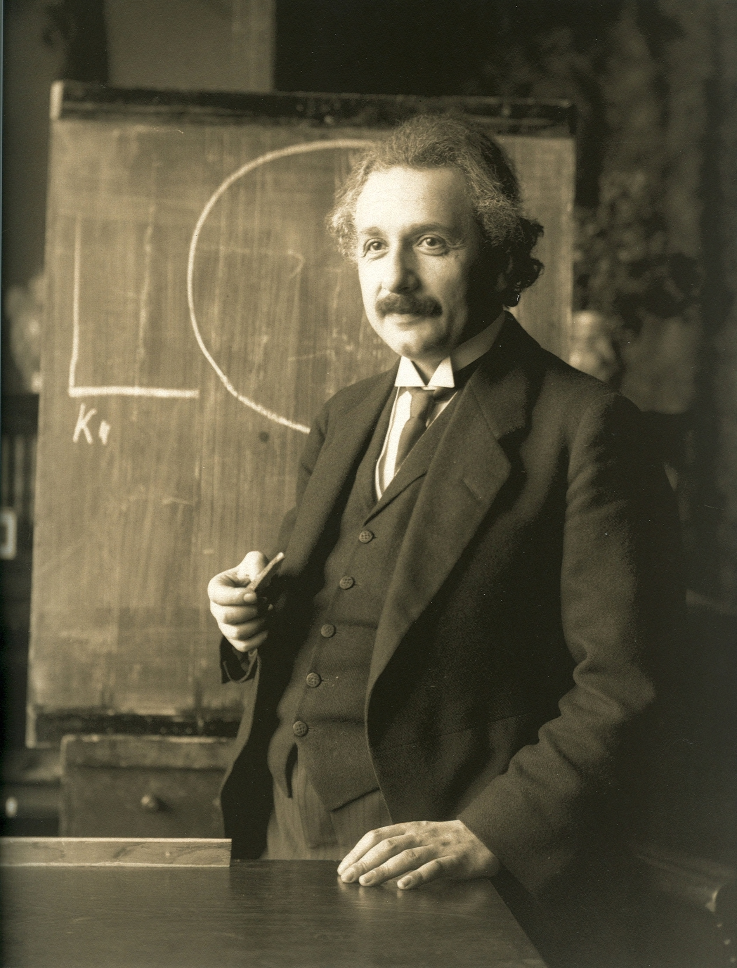 Albert Einstein during a lecture in Vienna in 1921